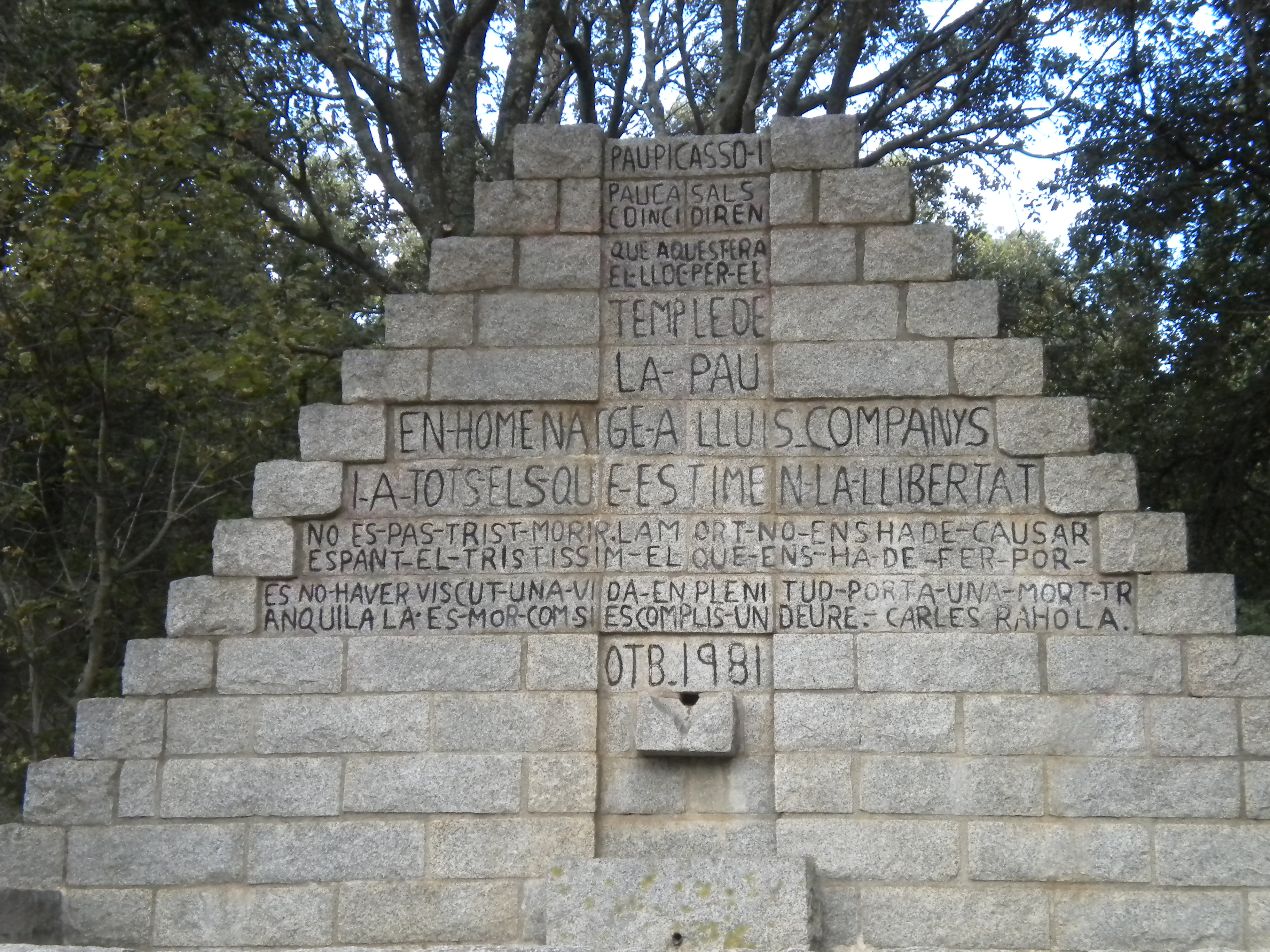 Monument en homenatge a Lluís Companys al Coll de Manrella (Agullana, Alt Empordà)